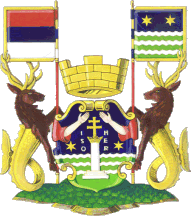 Das Wappen der Stadt und Gemeinde Ruma